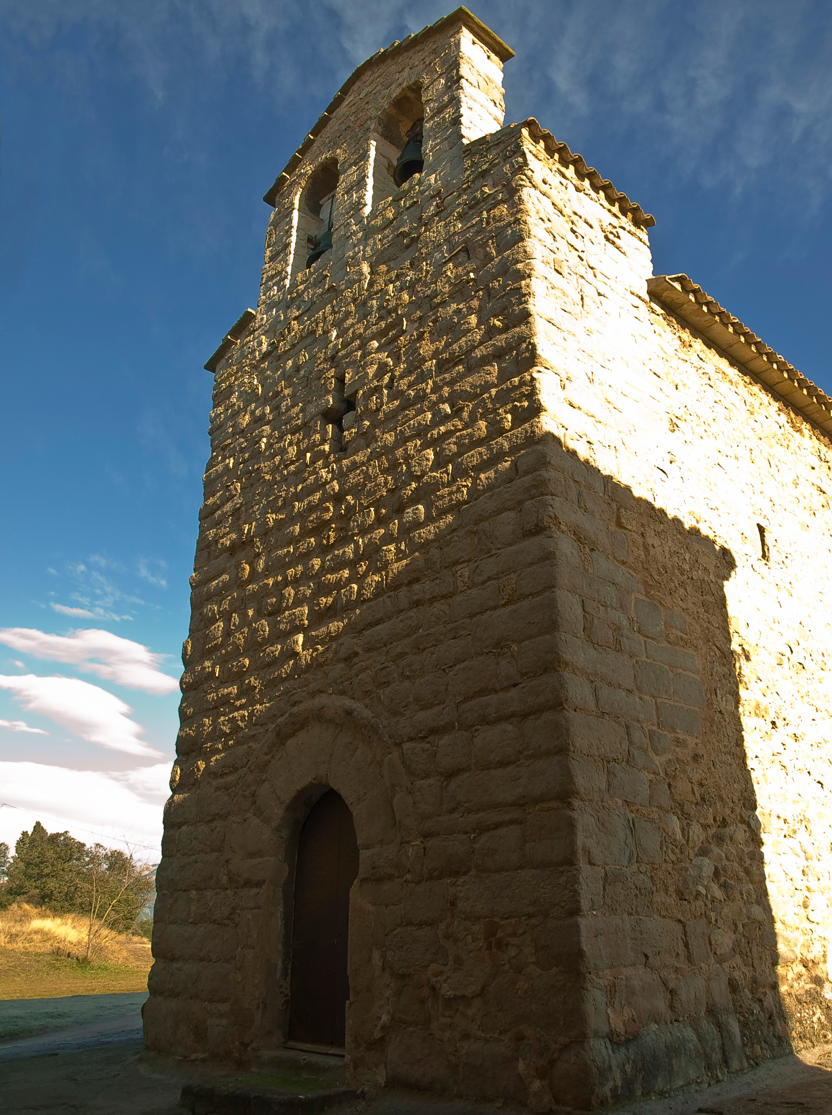 Sant Vicenç d'Obiols (Avià)